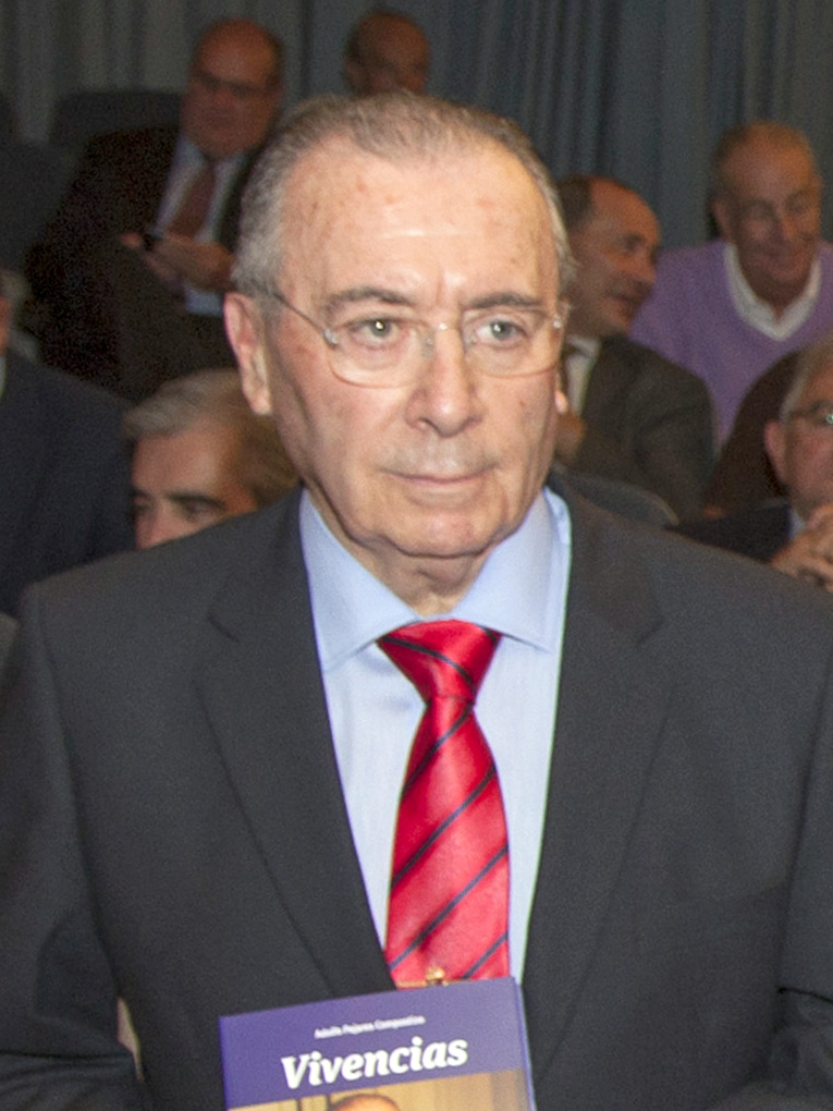 Imágenes de la presentación del libro de Adolfo Pajares Compostizo en el Ateneo de Santander.